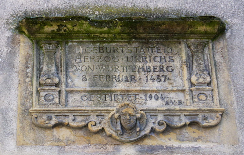 Reichenweiher Herzog Ulrich (Württemberg)